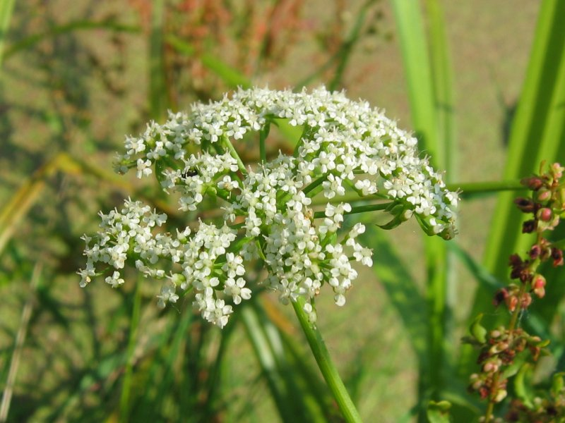 Berle (Berula erecta), Rostock